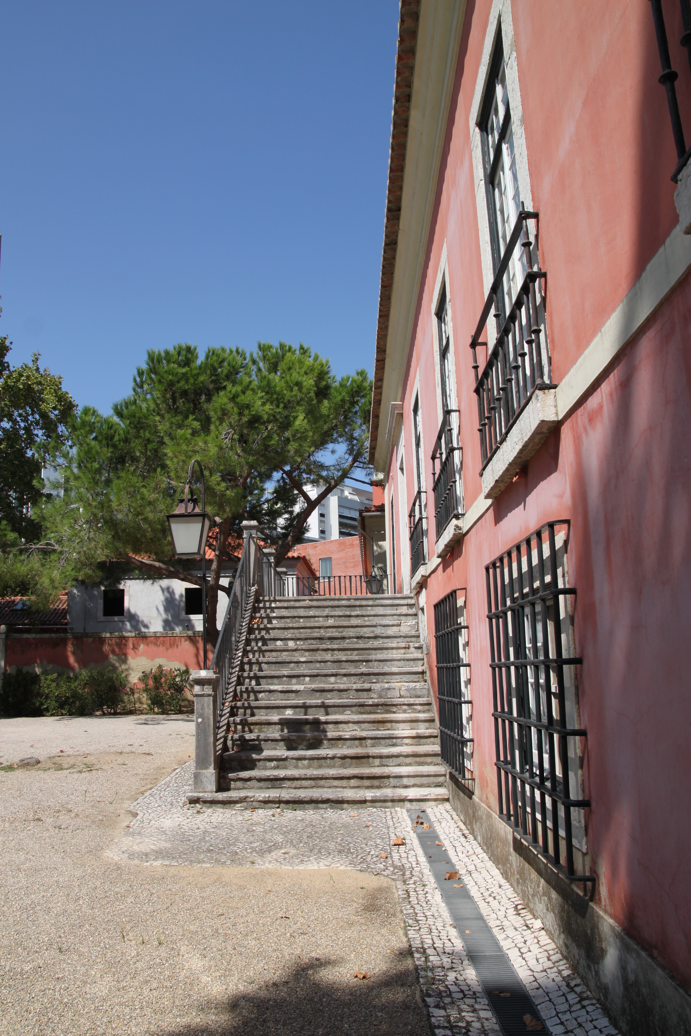 Quinta dos Lagares d'El-Rei This file was uploaded for Wiki Loves Monuments in Portugal with the unique identifier 75032.